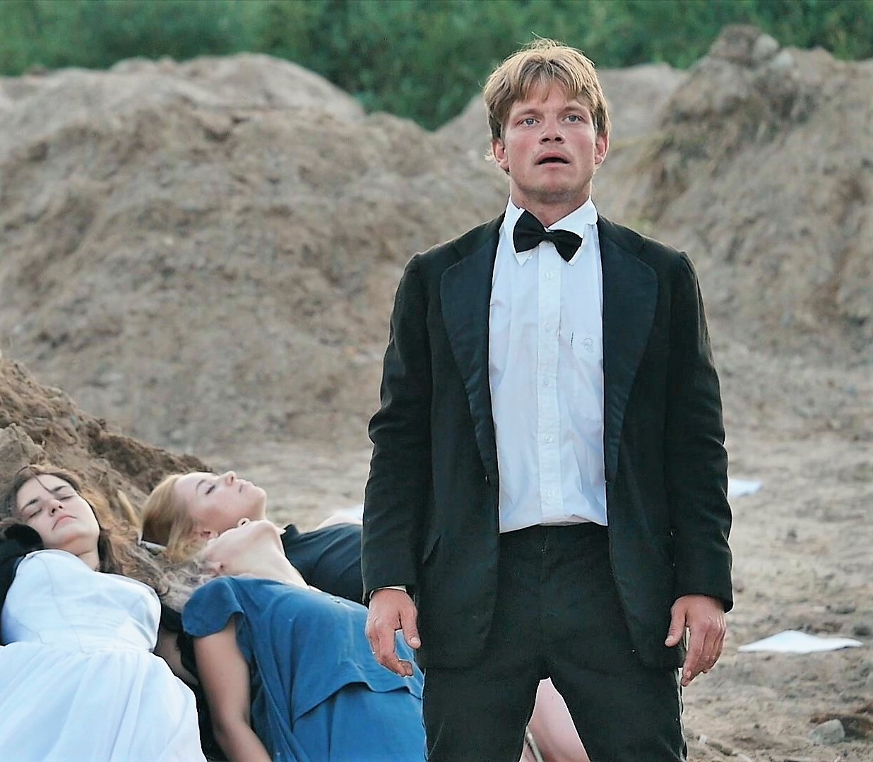 Сцена с открытой репетиции спектакля "Священный полет цветов", театр "ВелесО", июль 2018